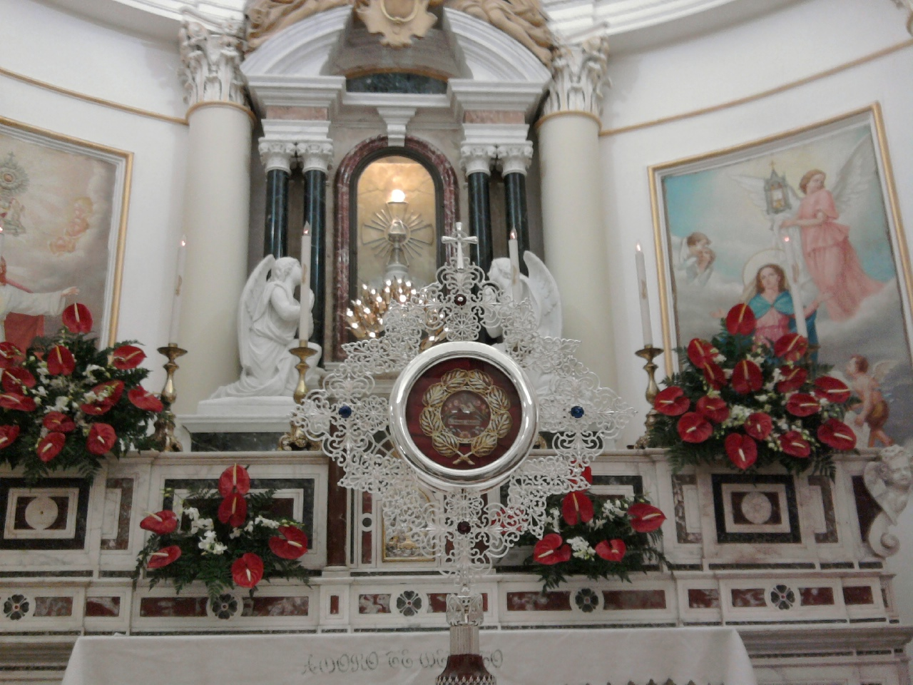 San Mauro La Bruca, chiesa di Sant'Eufemia; altare con le reliquie di San Mauro Abate.